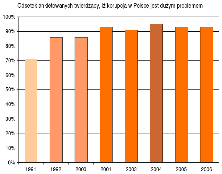 Wykres powstał na bazie danych z Centrum Badania Opinii Społecznej [1].